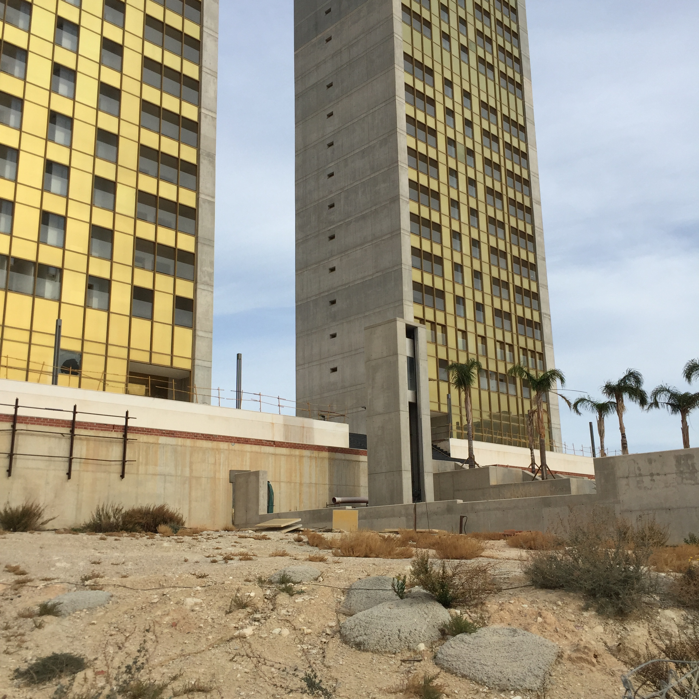 Edificio InTempo entrada 2